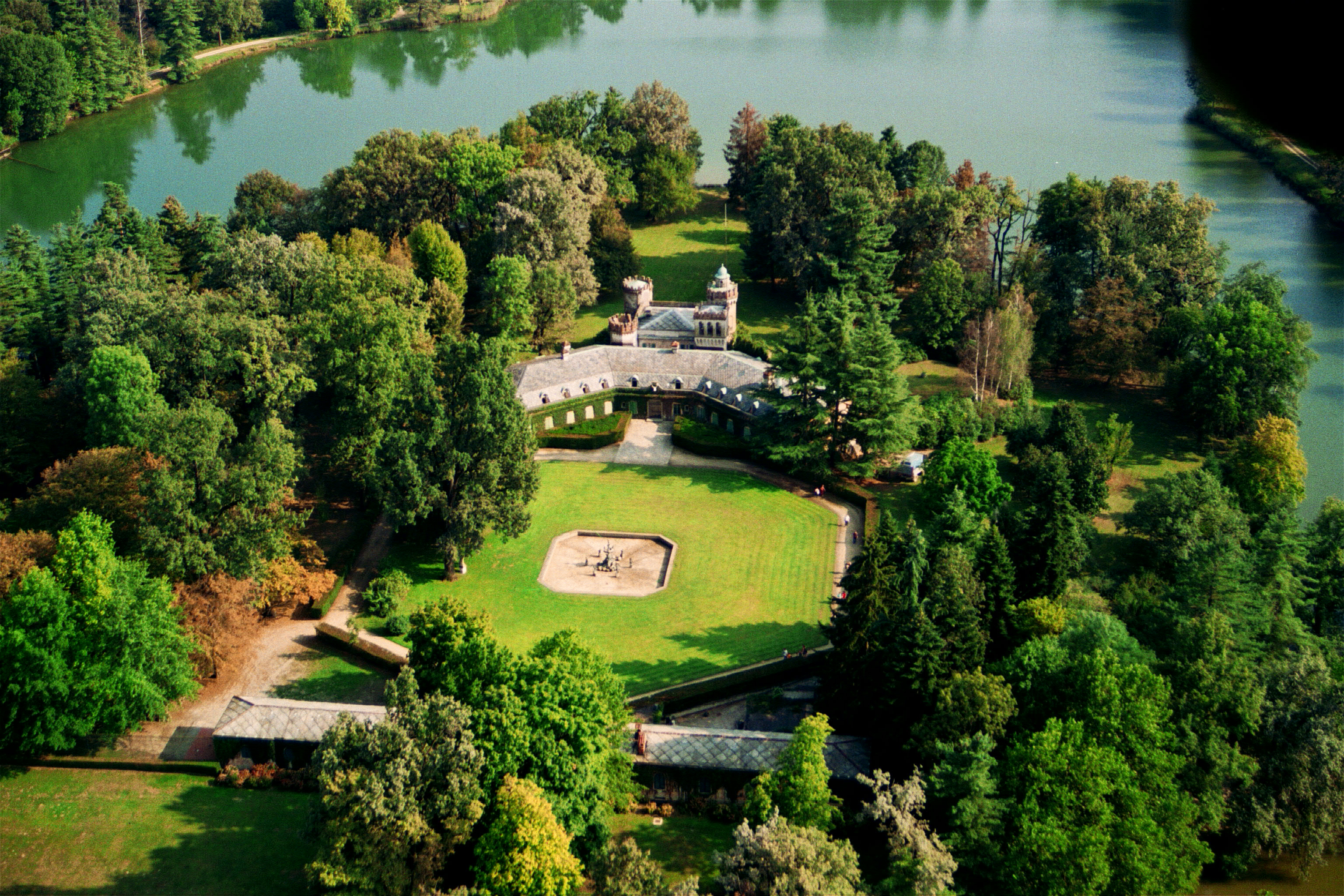 Villa dei Laghi, padiglione di caccia costruito negli anni 60 dell'800 con ingrandimenti novecenteschi.